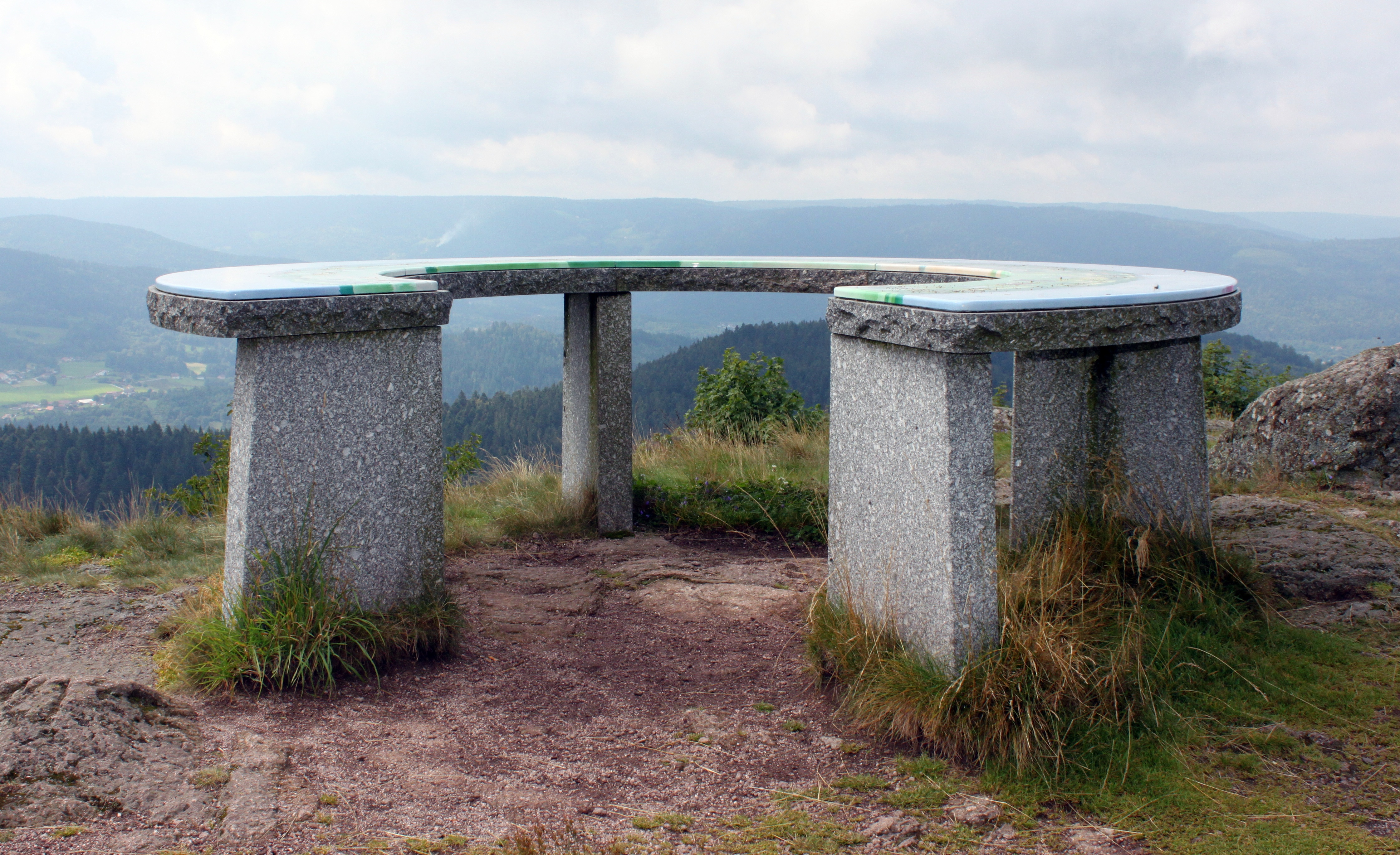 Vue de la table d'orientation, Le Haut du Tôt, Vosges, Lorraine, France